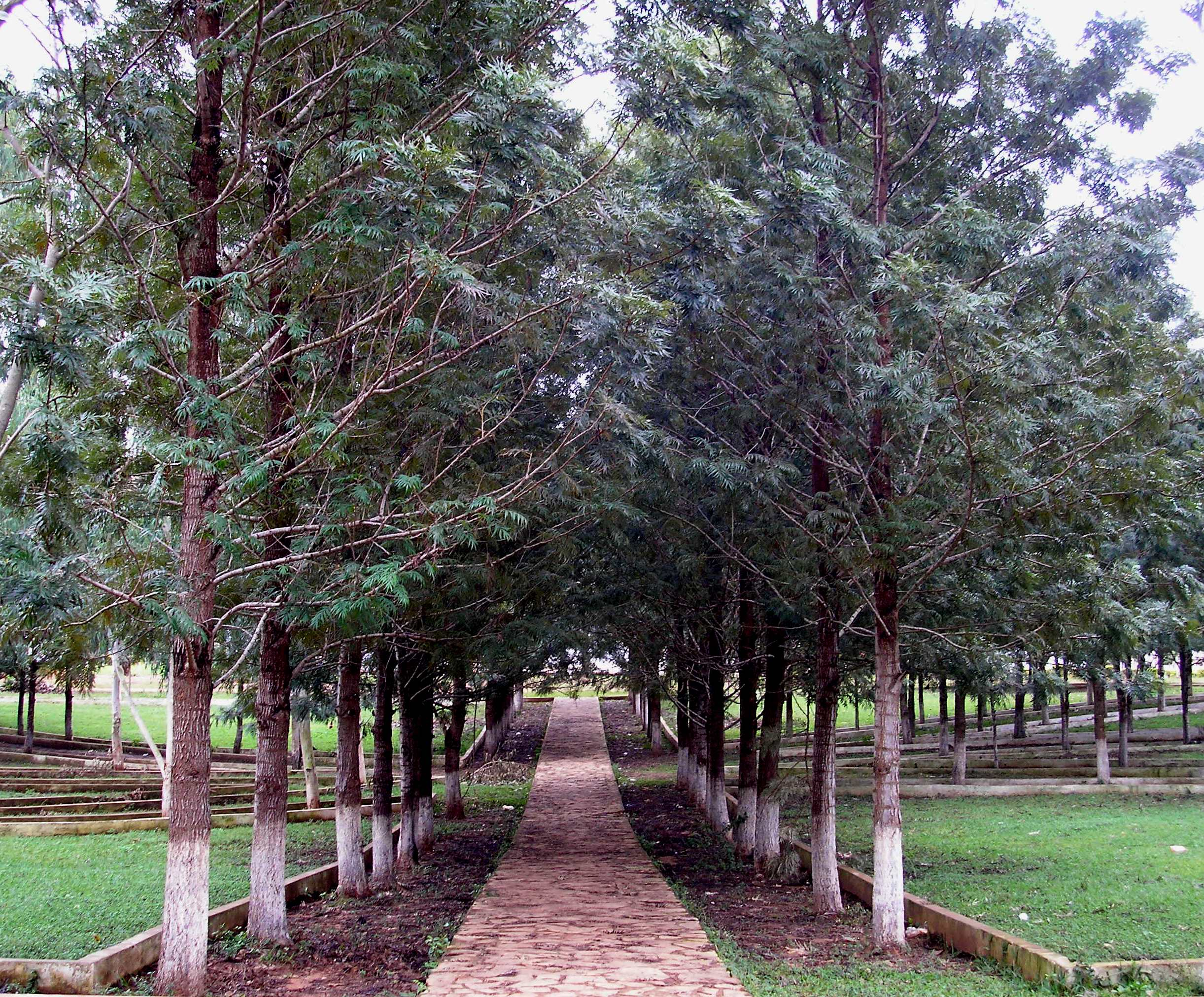 Esta es la Escuela Básica N 178 de la Ciudad de Veinticinco de Diciembre.